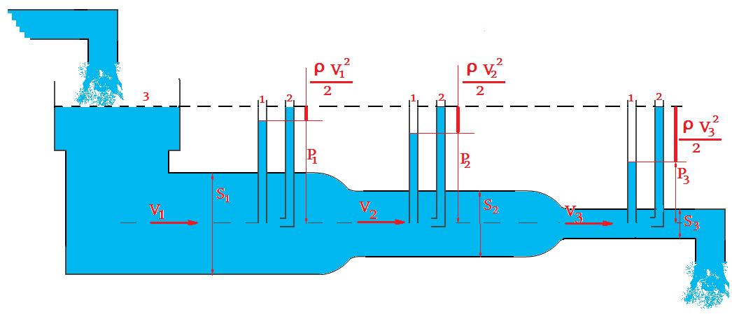 Bernoulli_equation scheme